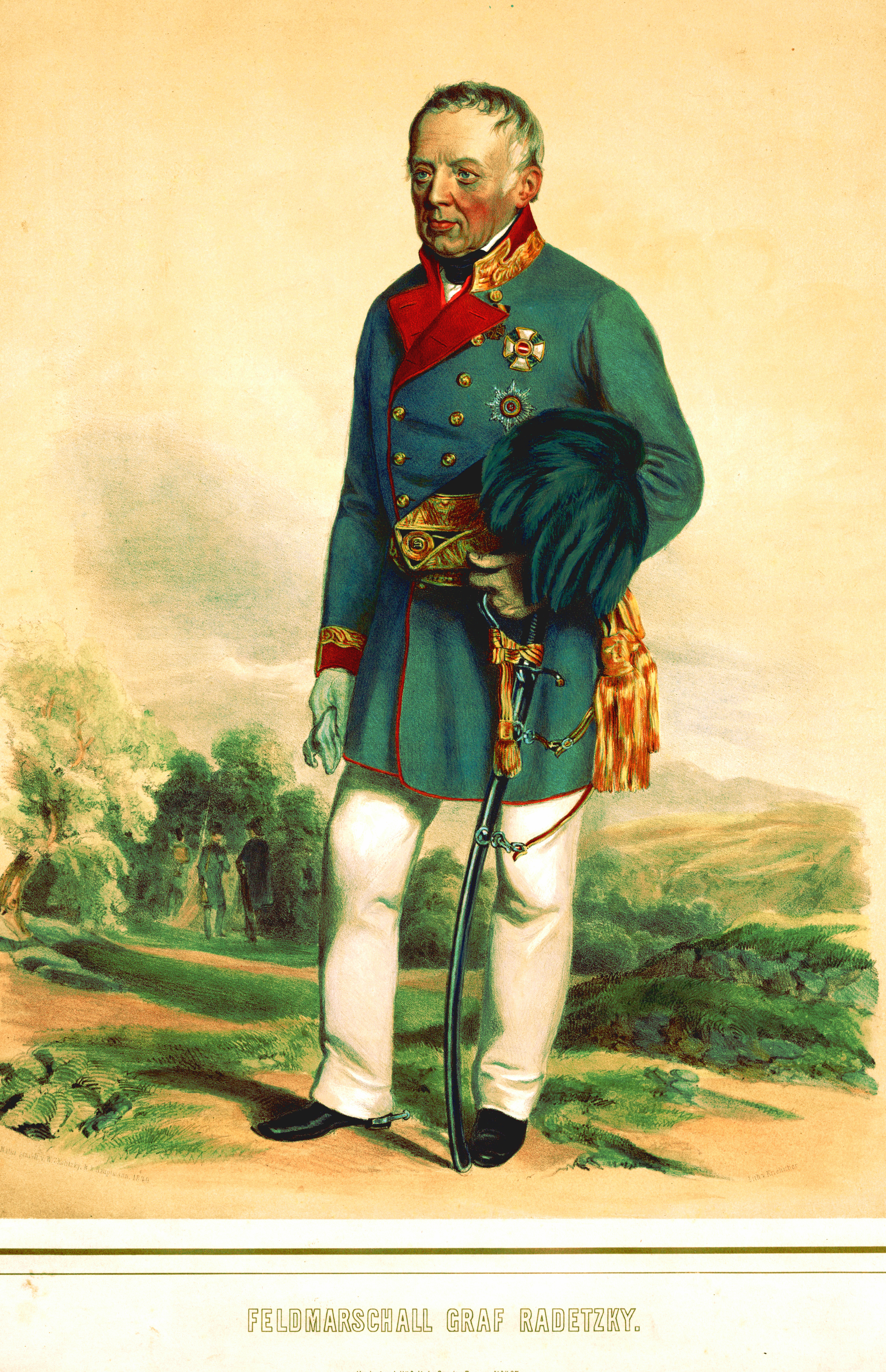 Joseph Wenzel Radetzky (teljes nevén: Johann Joseph Wenzel Anton Franz Karl Radetzky von Radetz gróf, cseh névformában Jan Josef Václav hrabě Radecký z Radče); (Trebnitz, Csehország, 1766. november 2. – Milánó, 1858. január 5.) cseh gróf, osztrák császári-királyi tábornagy (Feldmarschall), a 19. század jelentős katonai vezetője, nevéhez kötődik a bécsi szelet legendája